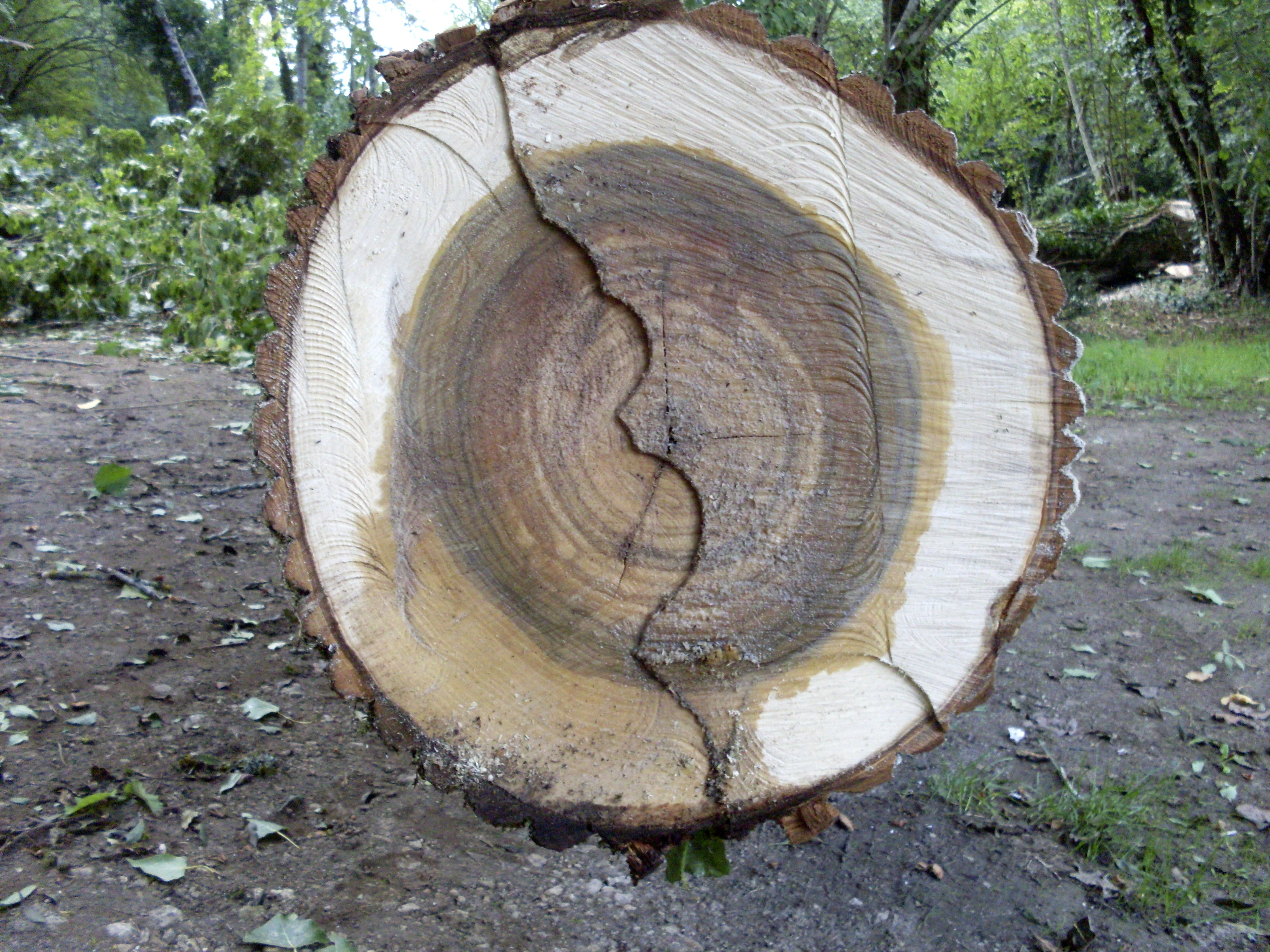 Peuplier qui vient d'être coupé